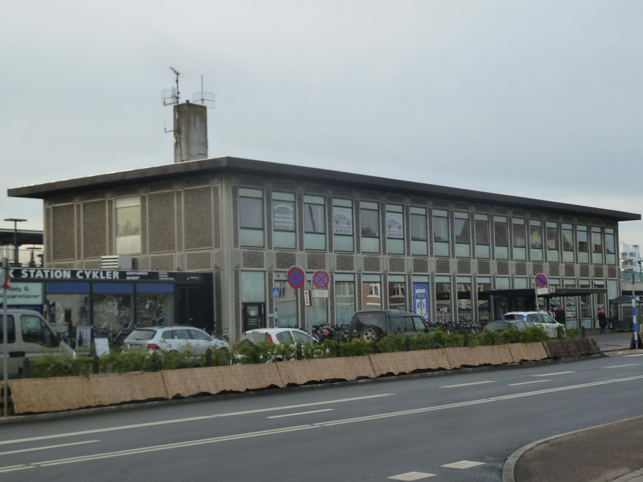 Holbæk Station on Nordvestbanen in Denmark.